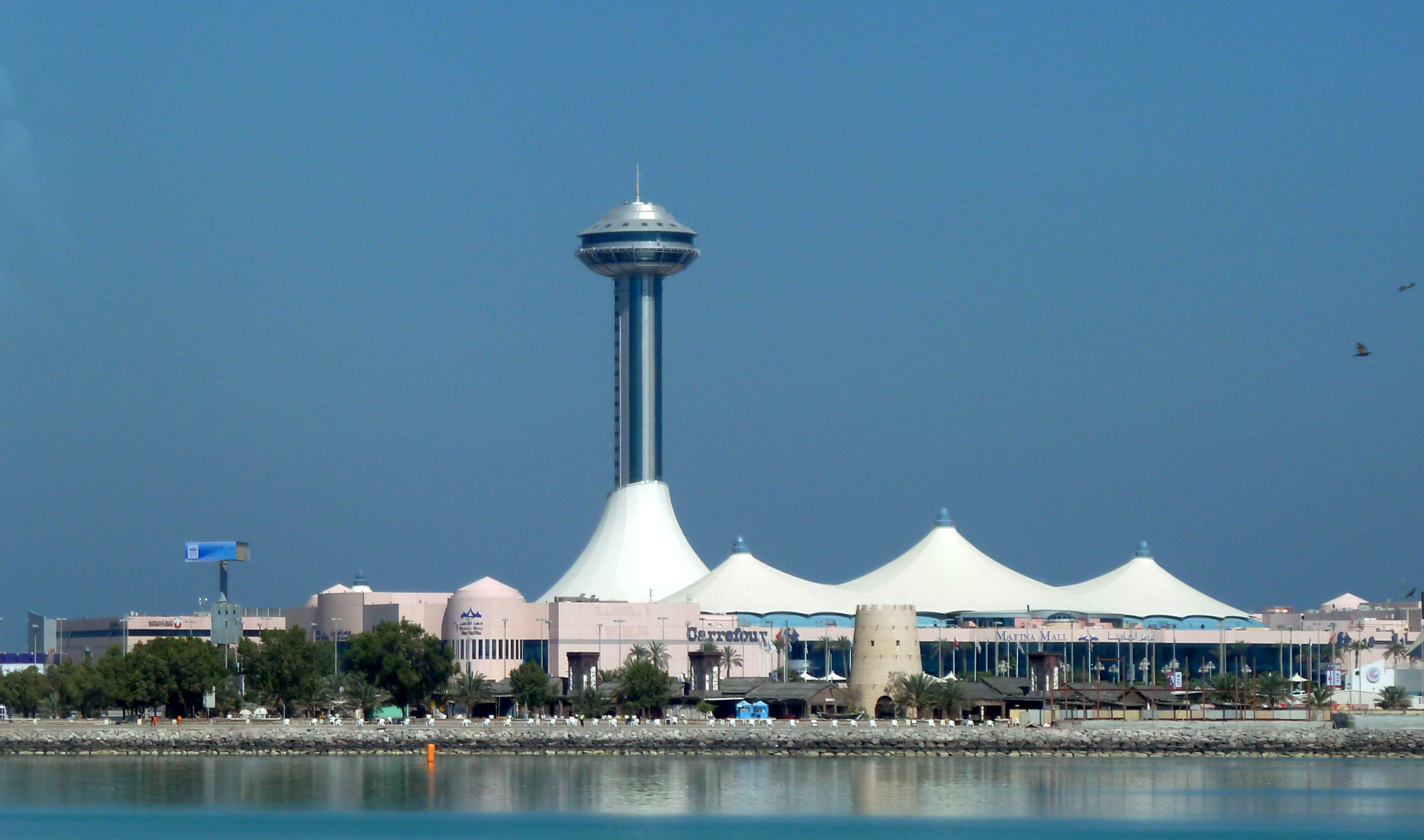 Abu Dhabi - Marina Shopping Mall --- أبو ظبي -- مارينا مول للتسوق